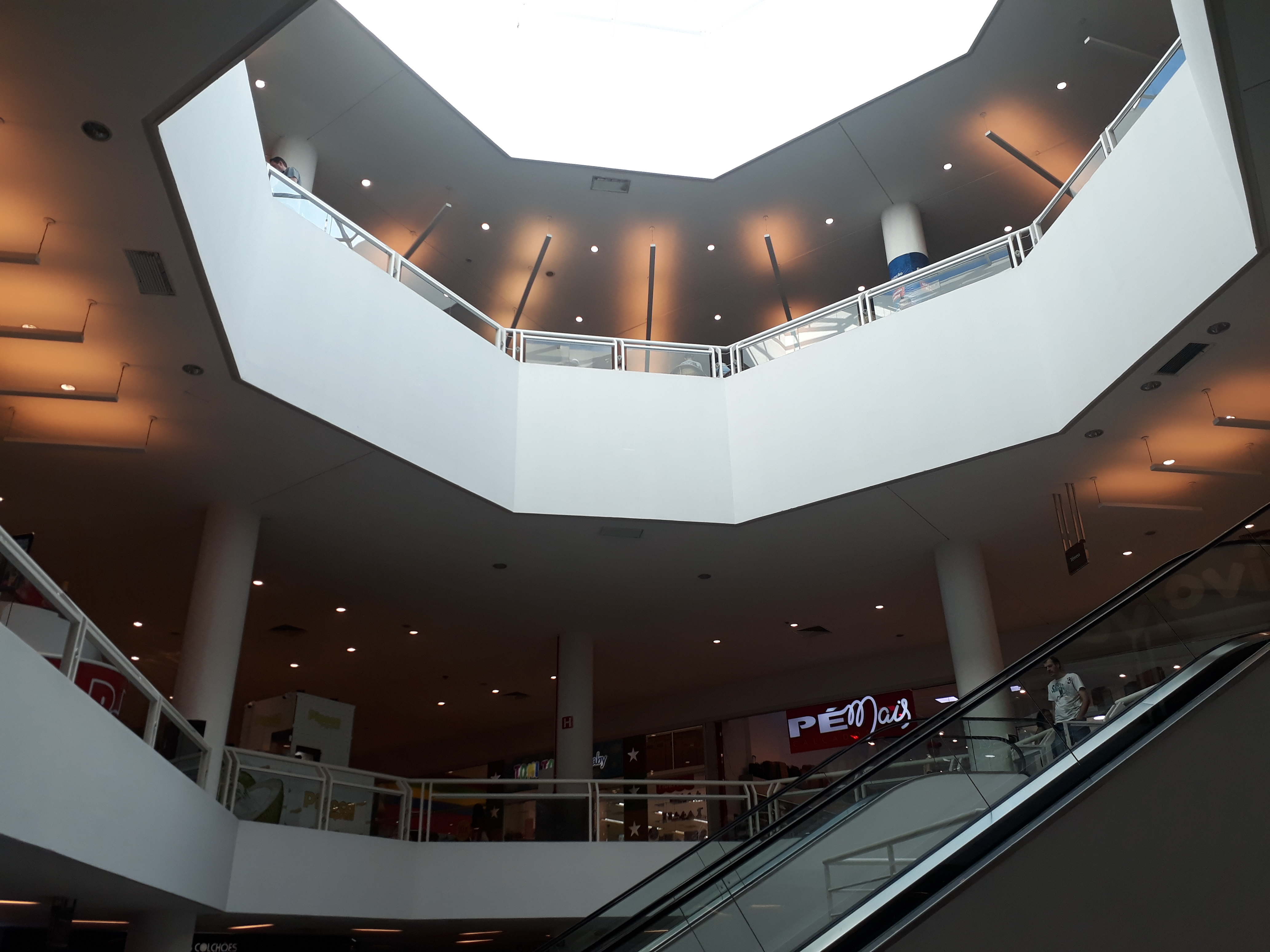 Shopping Palladium em Ponta Grossa, no Paraná.